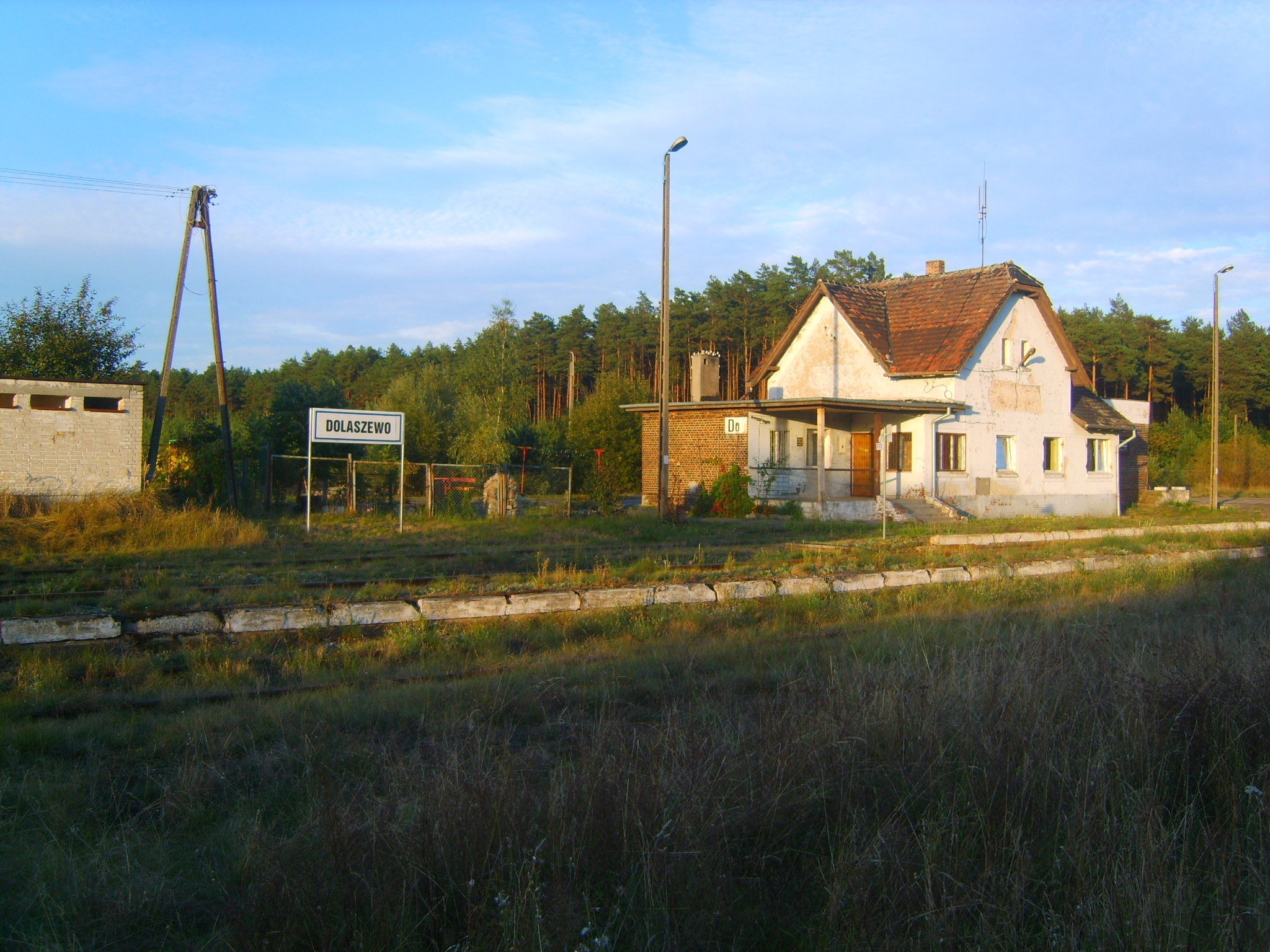 Przystanek kolejowy w Dolaszewie.